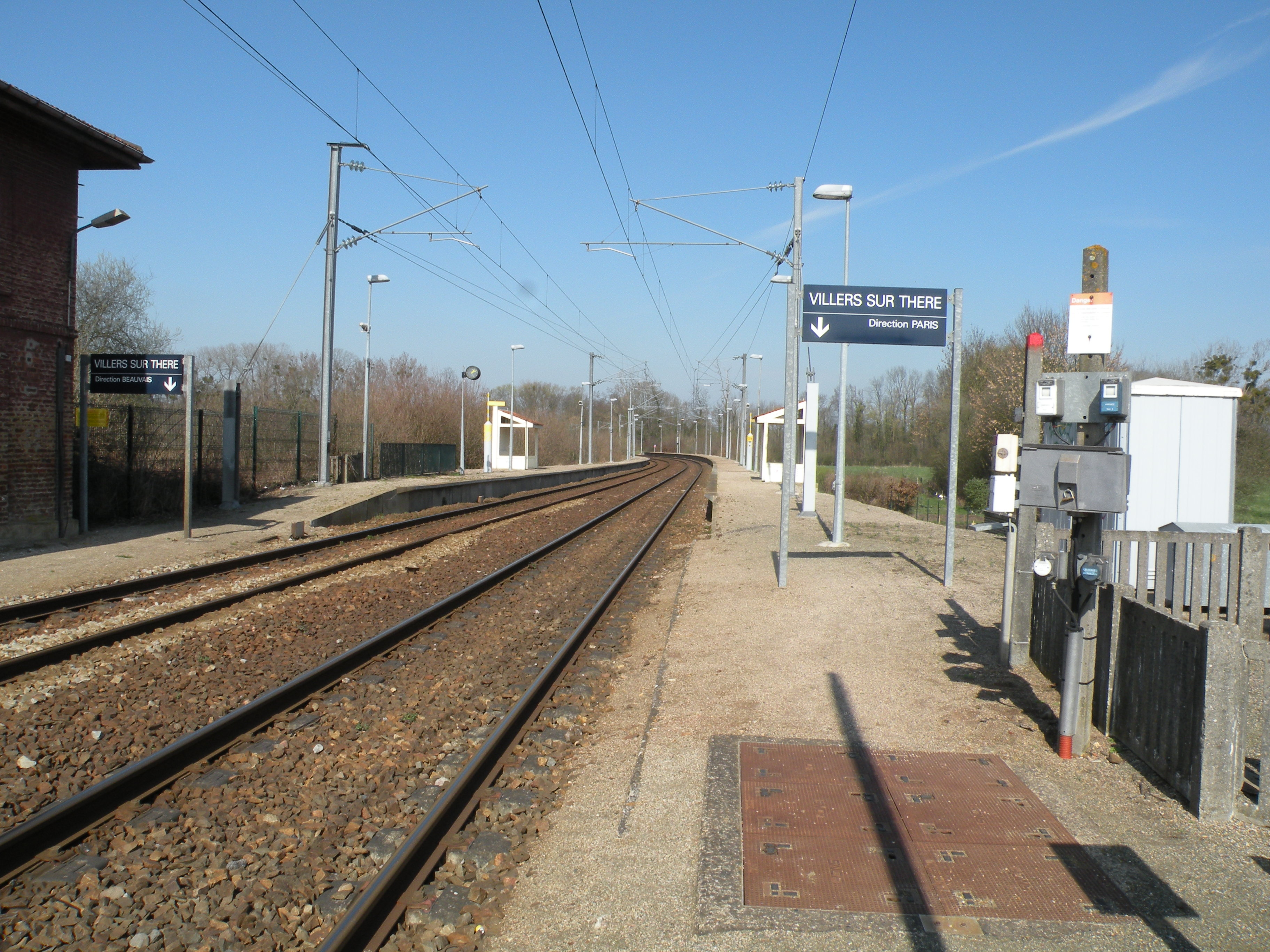 quai de la gare de Villers-sur-Thère